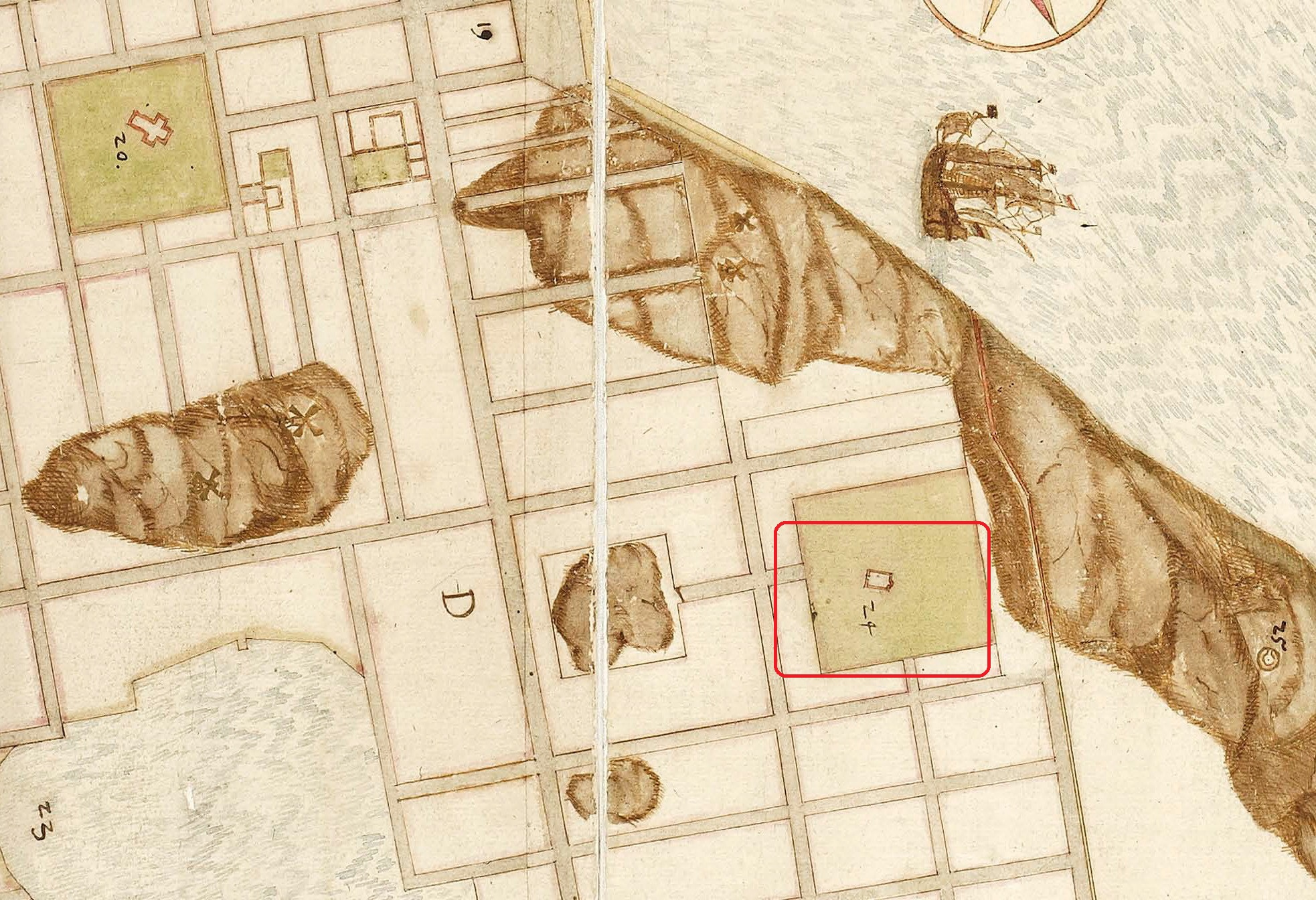 Del av dansk 1640-talskarta över Stockholm visande noröstra Södermalm. D. Sydermalm 19. Rydske boden 20. Sydermalmskirke 23. Fattigbo 24. Sydermalmskapell 25. Galgen